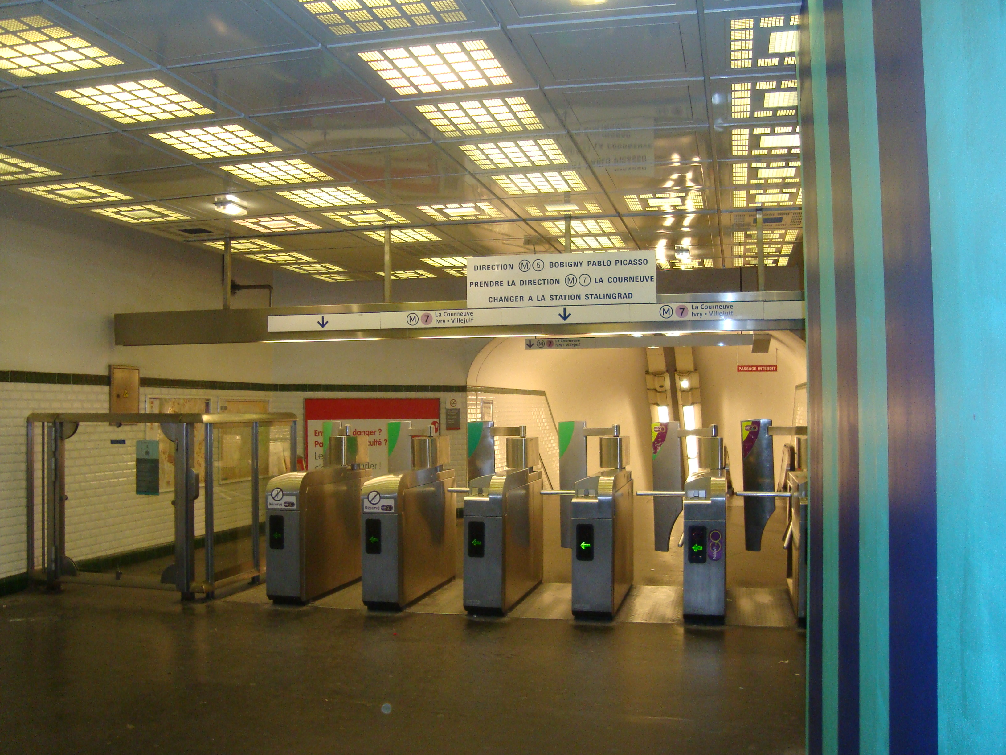 Tourniquets d'accès aux quais de métro de la statio Château-Landon sur la ligne 7.